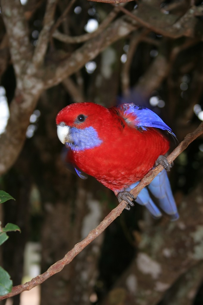 Crimson Rosella, Platycercus elegans